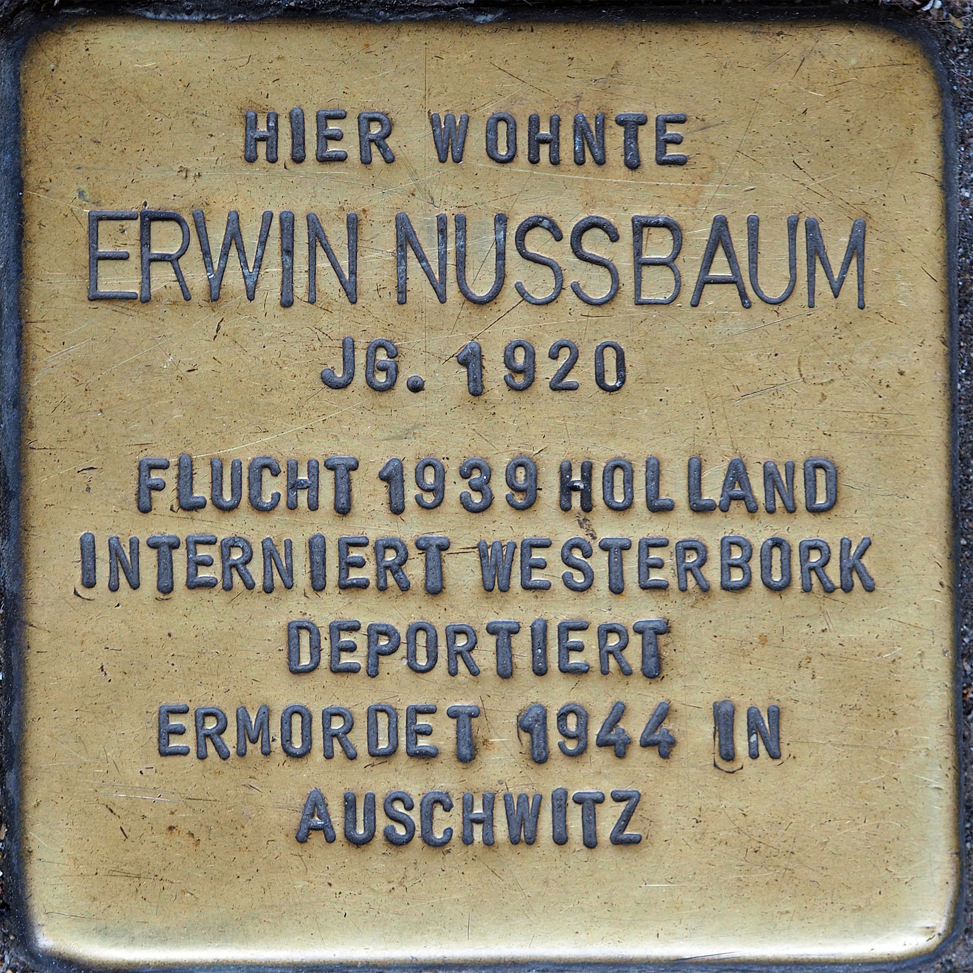 Stolpersteine MG: Nussbaum, Erwin